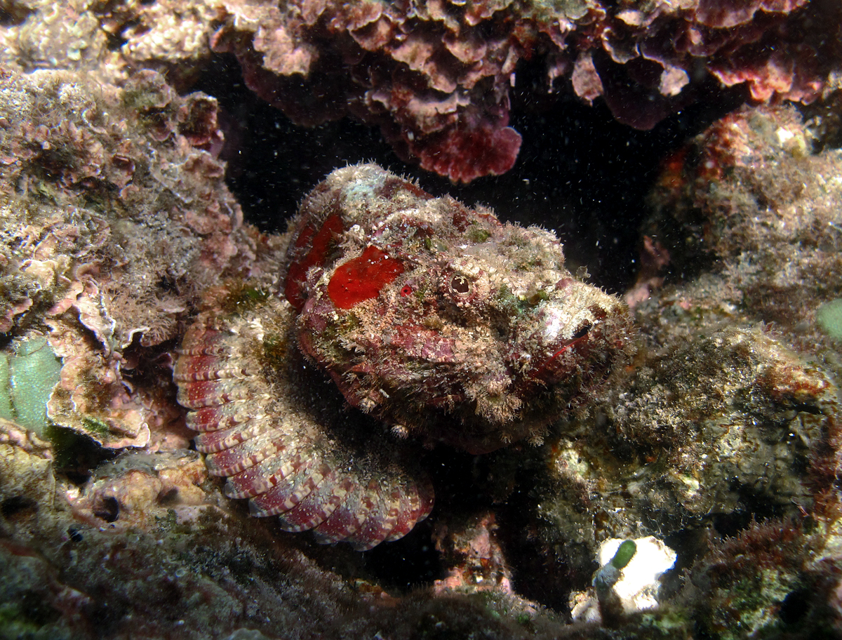 Un poisson-scorpion à bosse (Scorpaenopsis gibbosa) à la Réunion.